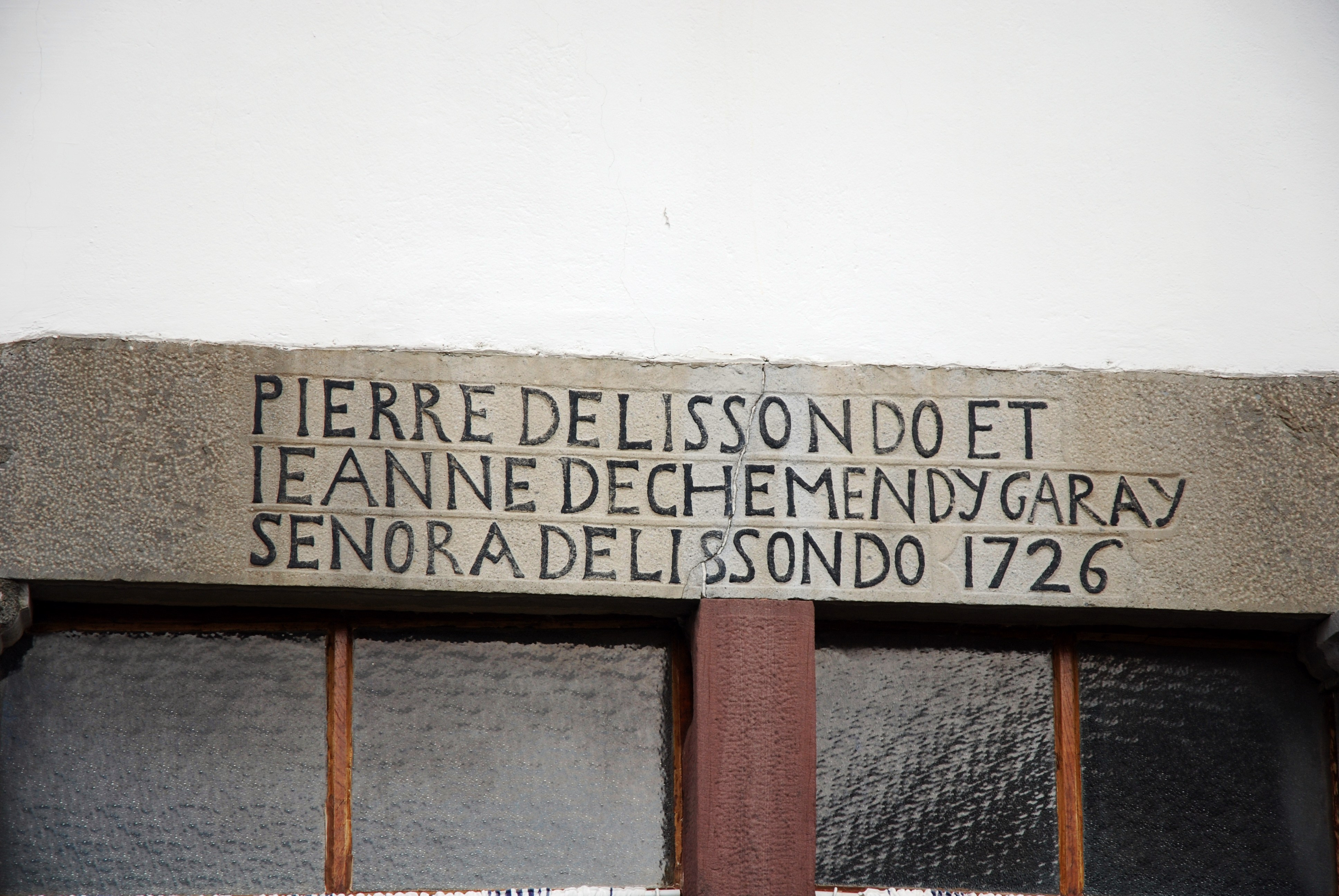 Jaxu, linteau sculpté